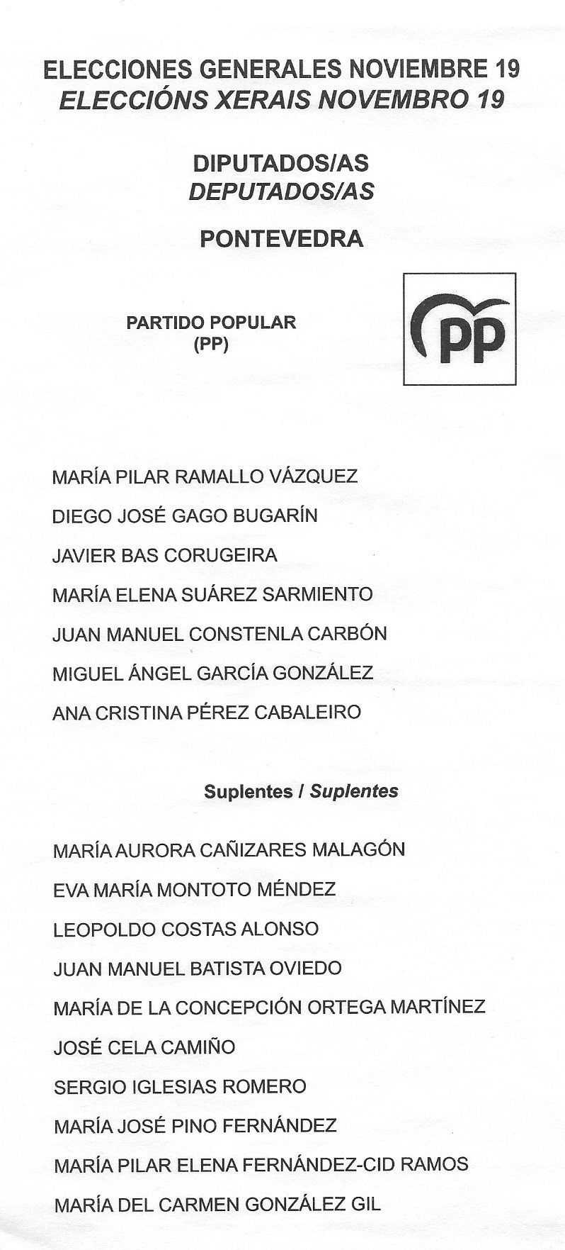 Papeleta electoral do Partido Popular para o Congreso - Eleccións Xerais de España de novembro de 2019, circunscrición de Pontevedra